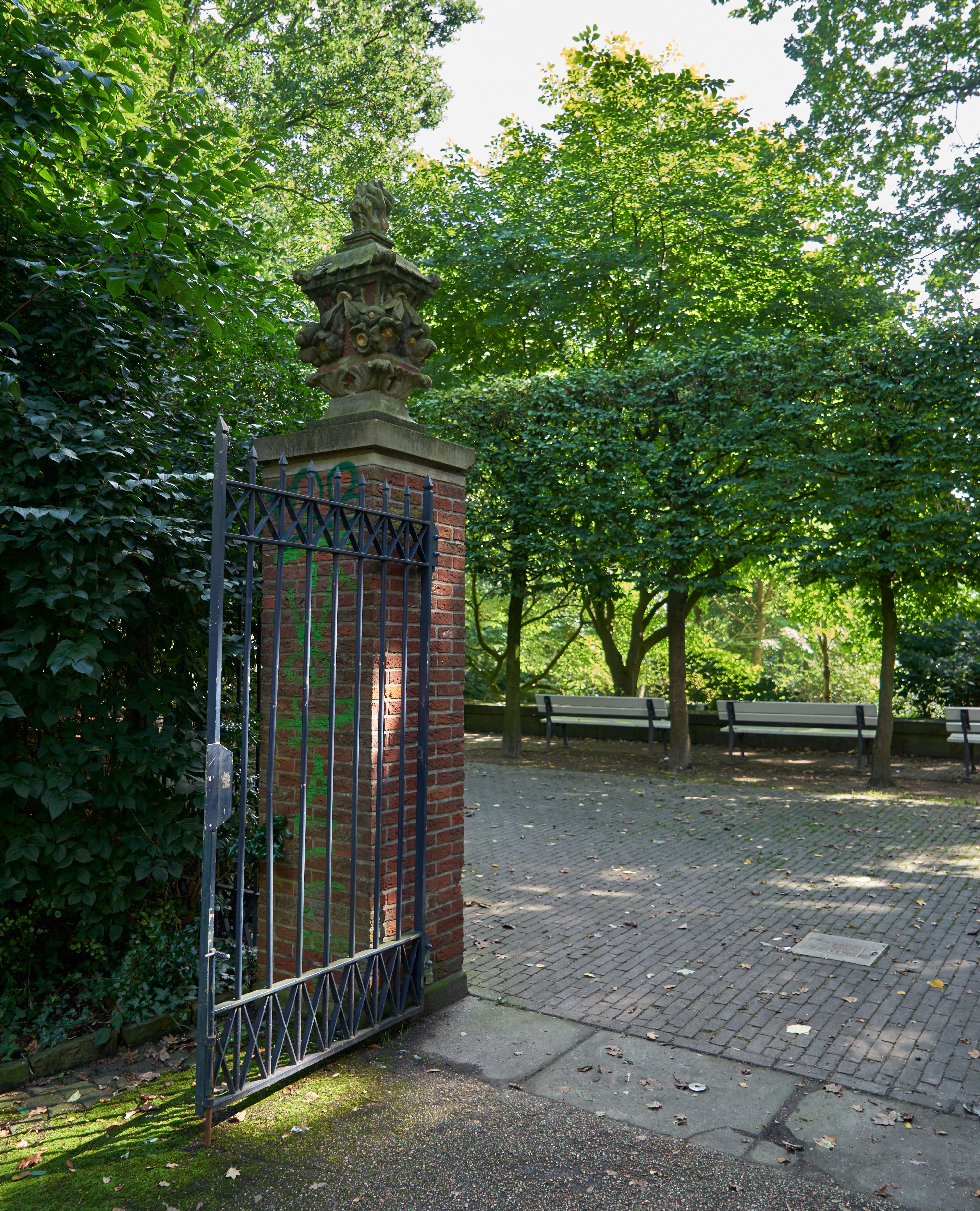 Theatergarten in Bremen, Toranlage Nordseite (linker Pfosten).Das abgebildete Objekt ist ein geschütztes Kulturdenkmal in der Freien Hansestadt Bremen, mit der Nr. 1193,T013 beim Landesamt für Denkmalpflege registriert.